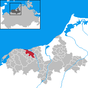 Bad Doberan in Mecklenburg-Western Pomerania - District Bad Doberan